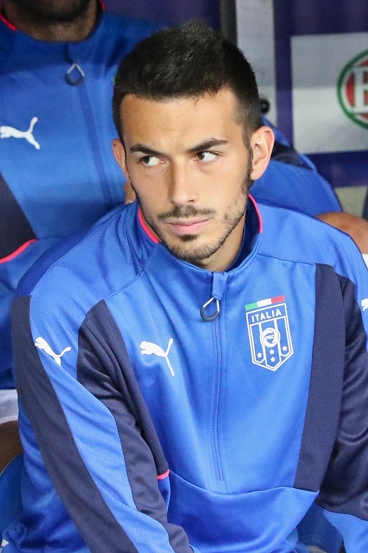 20150616 - Portugal - Italie - Genève - Nicola Sansone